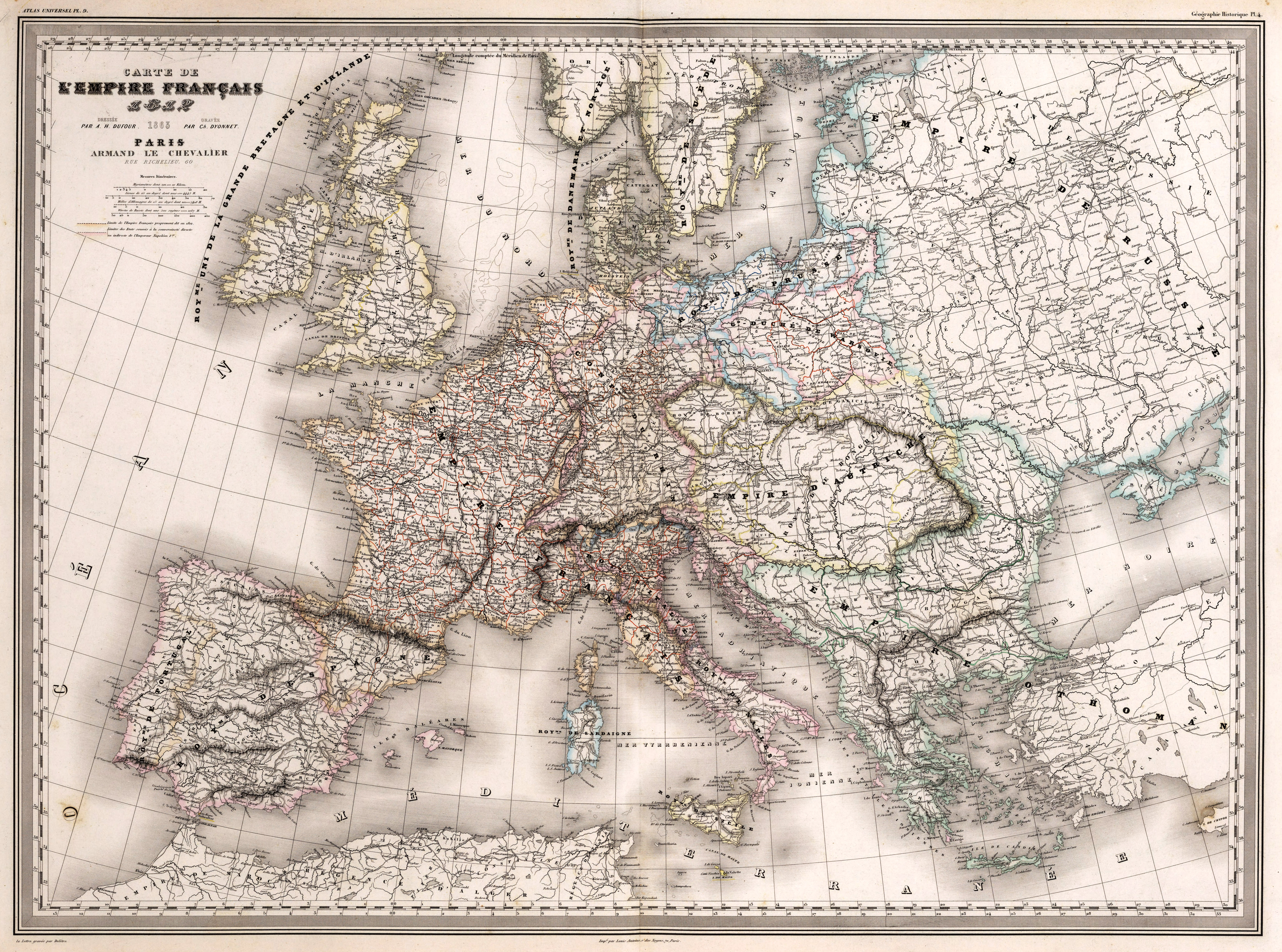 Carte de l'Empire Francais 1812 : Dresse par A.H. Dufour. Gravee par Ch. Dyonnet. Paris, Armand Le Chevalier, Rue Richelieu, 60. La Lettre gravee par Deletre. Impe. par Louis Antonie, r. de Cluny 1, Paris. (to accompany) Atlas Universel, Physique, Historique Et Politique De Geographie Ancienne Et Moderne. Pl. 9. (on upper margin) Geographie historique Pl. 4.